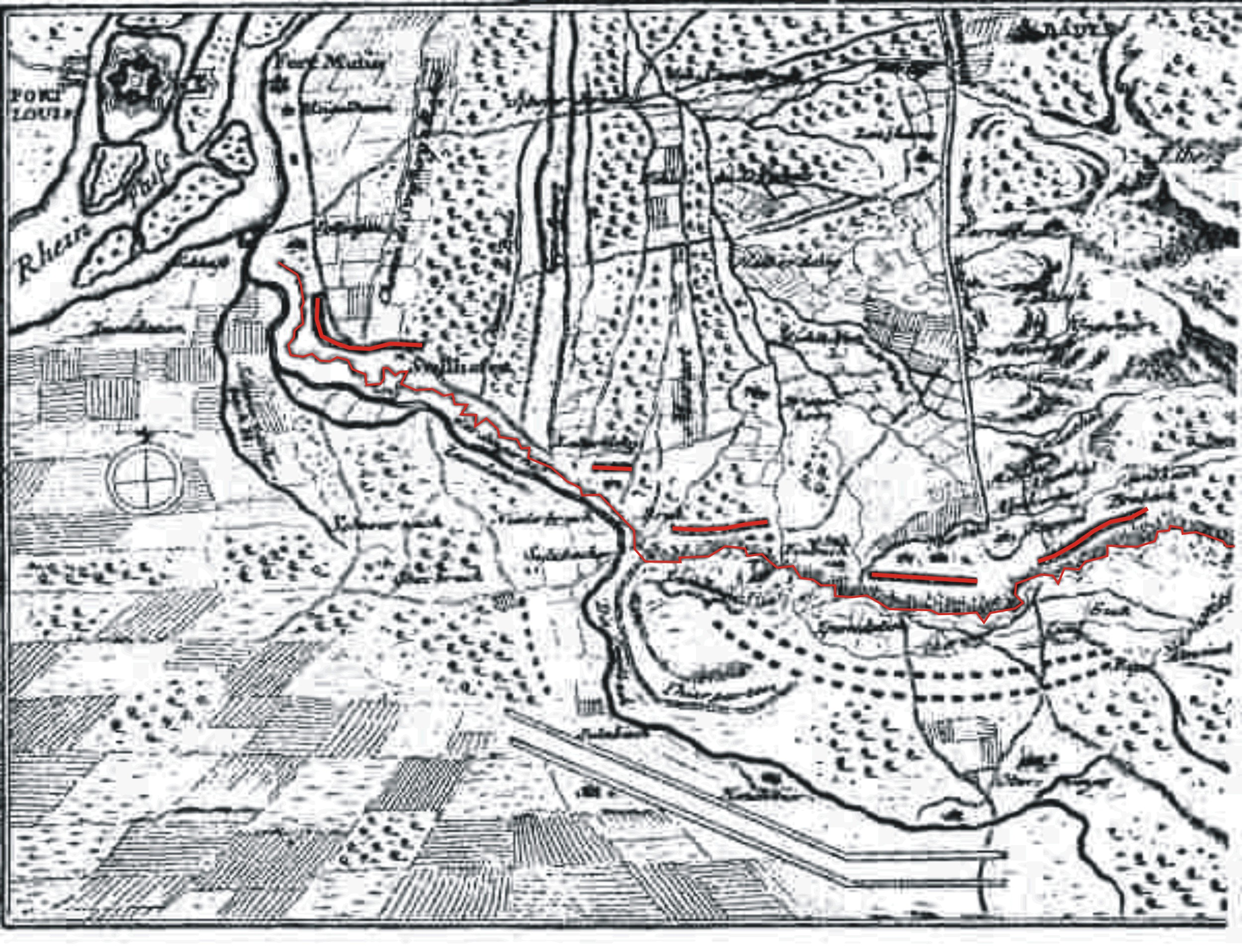 Bühl-Stollhofener-Linien (Ausschnitt aus alter Karte um 1705)